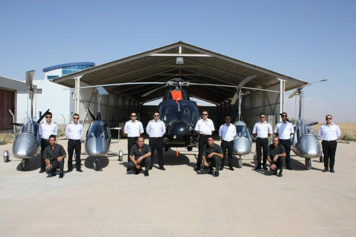 The 7 Group Gyros und Heli in Erbil